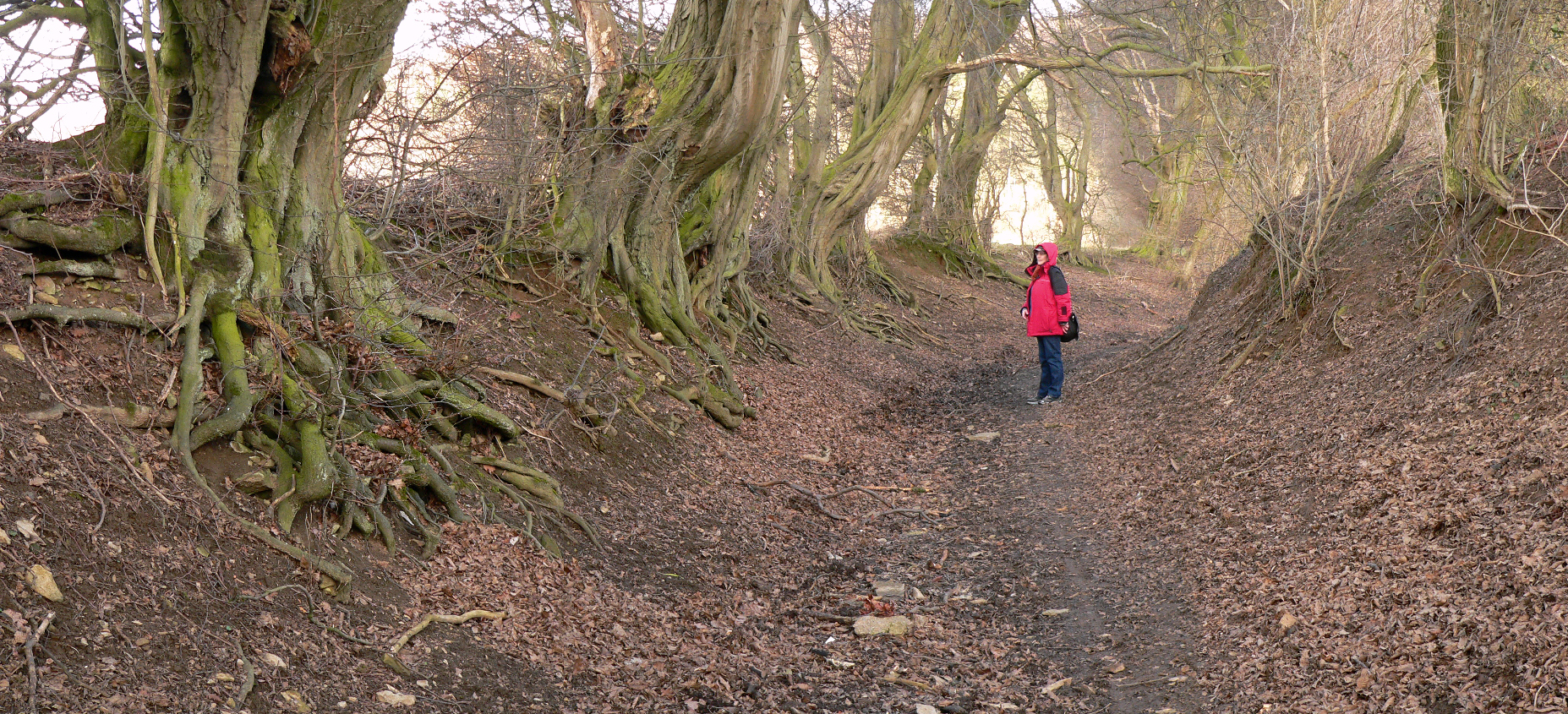 Hohlweg nahe der Deisterpforte